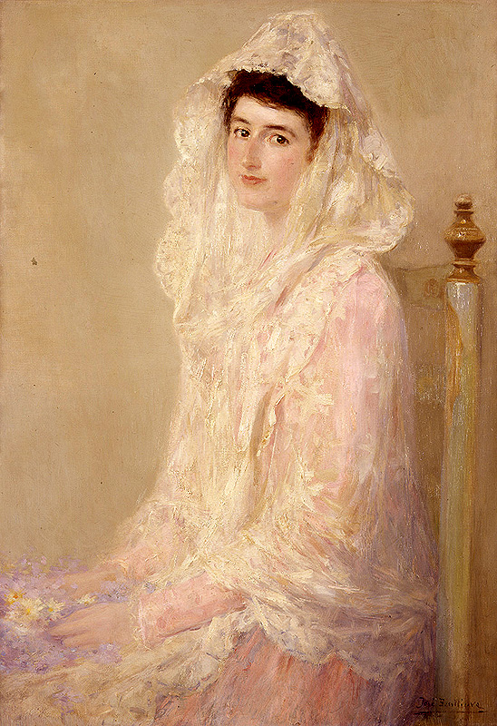 Retrato de María Benlliure Ortiz (1881-1968), que fue hija del pintor José Benlliure y Gil y de María Ortiz Fullana.